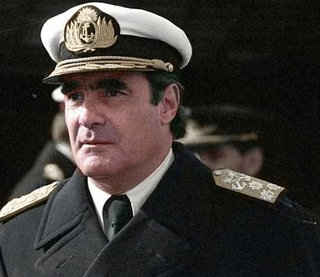 Emilio Massera en 1975.